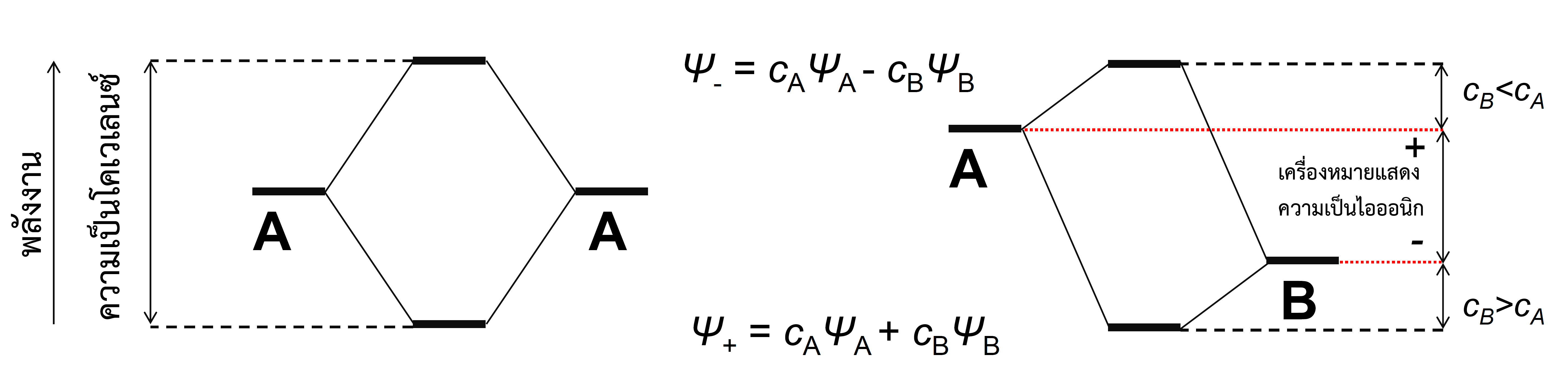 MO Diagram for Oxidation State Difinition